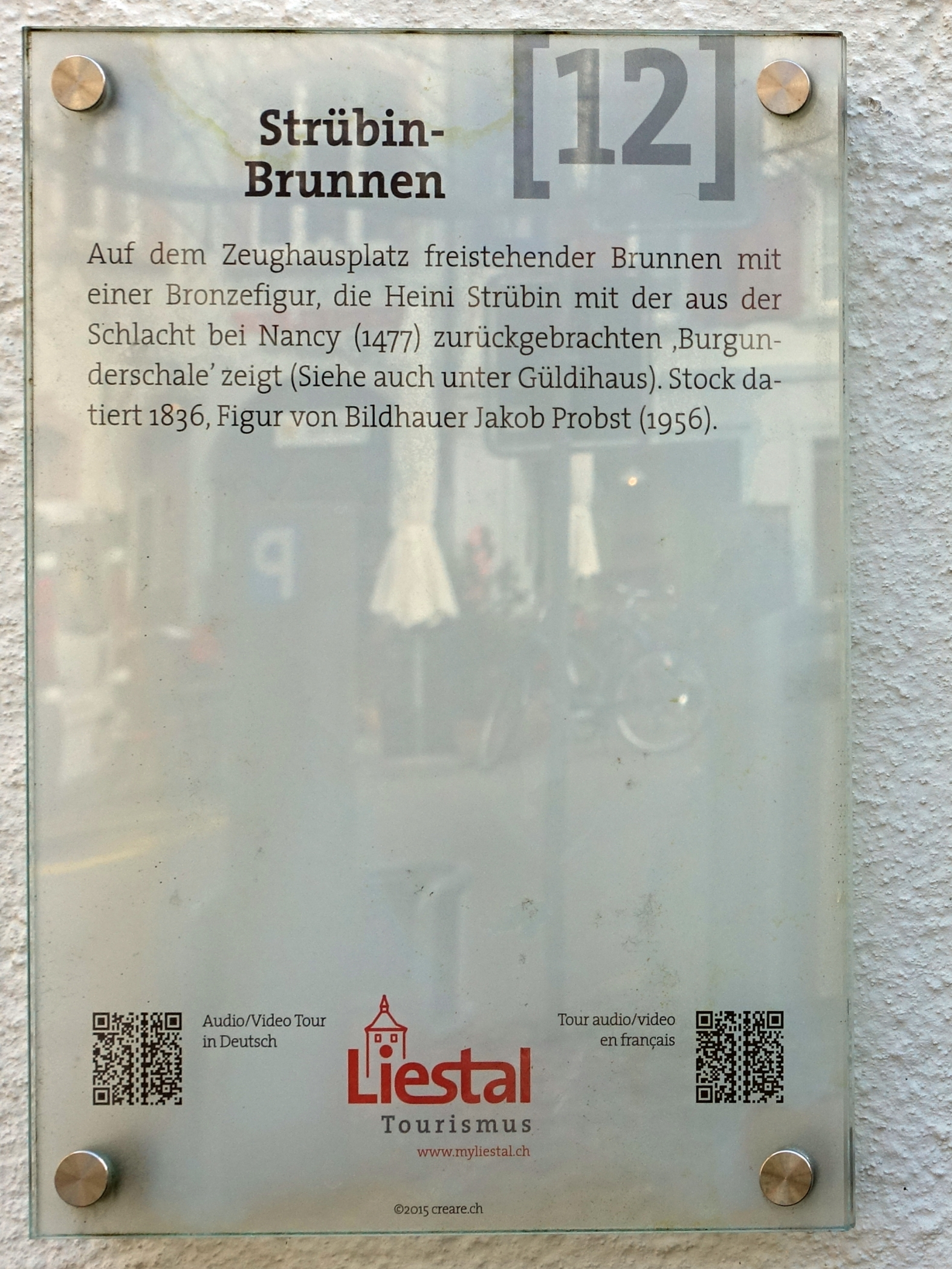 Heinrich Strübin (1450–1517) Information zu dem Skulptur-Brunnen vor dem Museum Basel-Land in Liestal, Schweiz